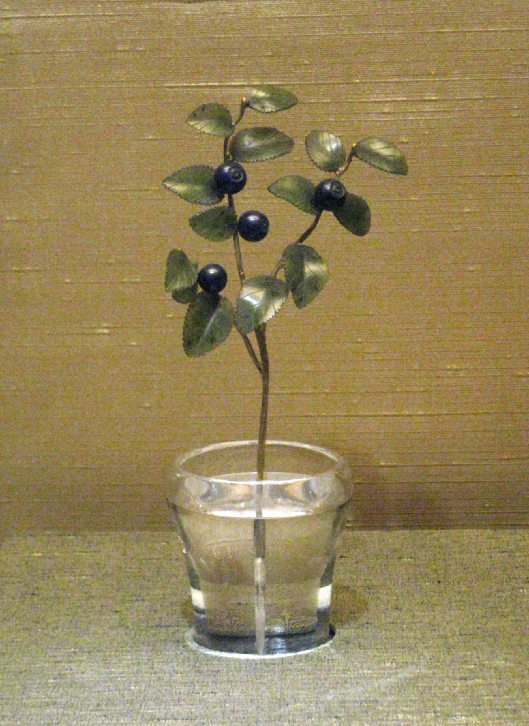 Ветки черники. СПб, ок. 1908. Фирма Фаберже. Нефрит, лазурит, горный хрусталь, цветное золото. Эрмитаж.